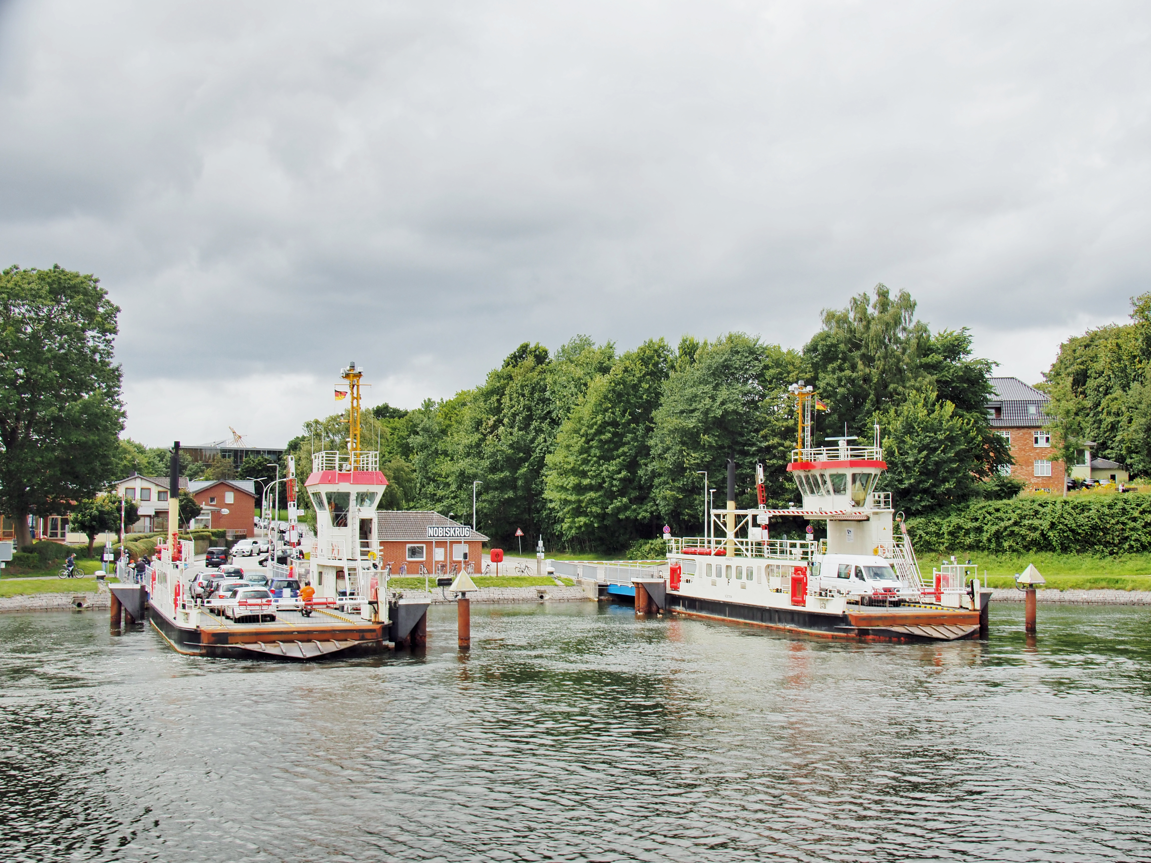 Beide Nobisfähren am Fähranleger Schacht-Audof